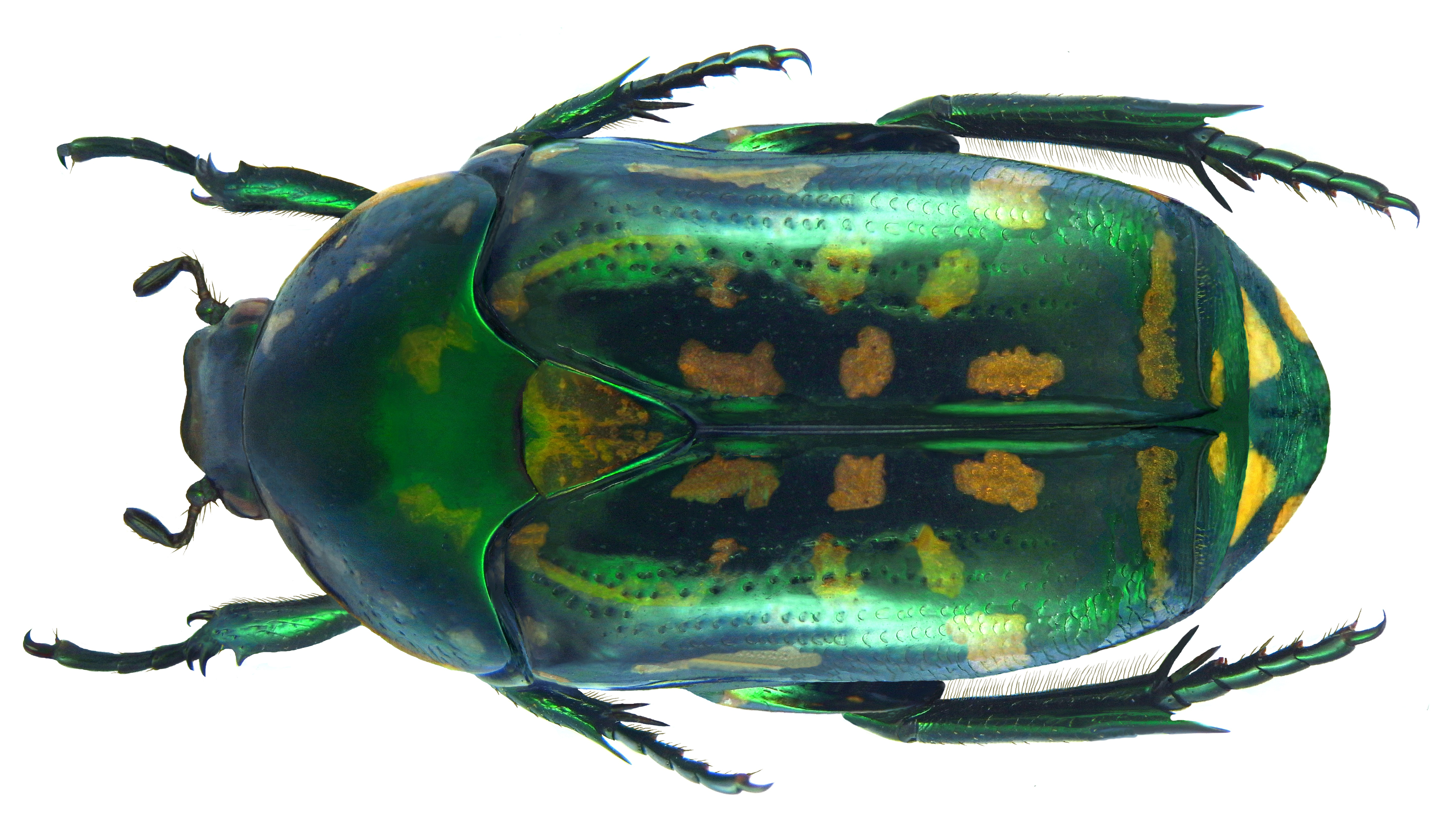 Familie: Scarabaeidae Groesse: 17,7 mm Verbreitung: Indonesien, Kei-Islands Fundort: Indonesien, Kei-Islands, Tual-City, Ohoidertawun Village leg. A.Weigel, 17.-20.II.2011; det. U.Schmidt, 2011 Photo: U.Schmidt, 2011